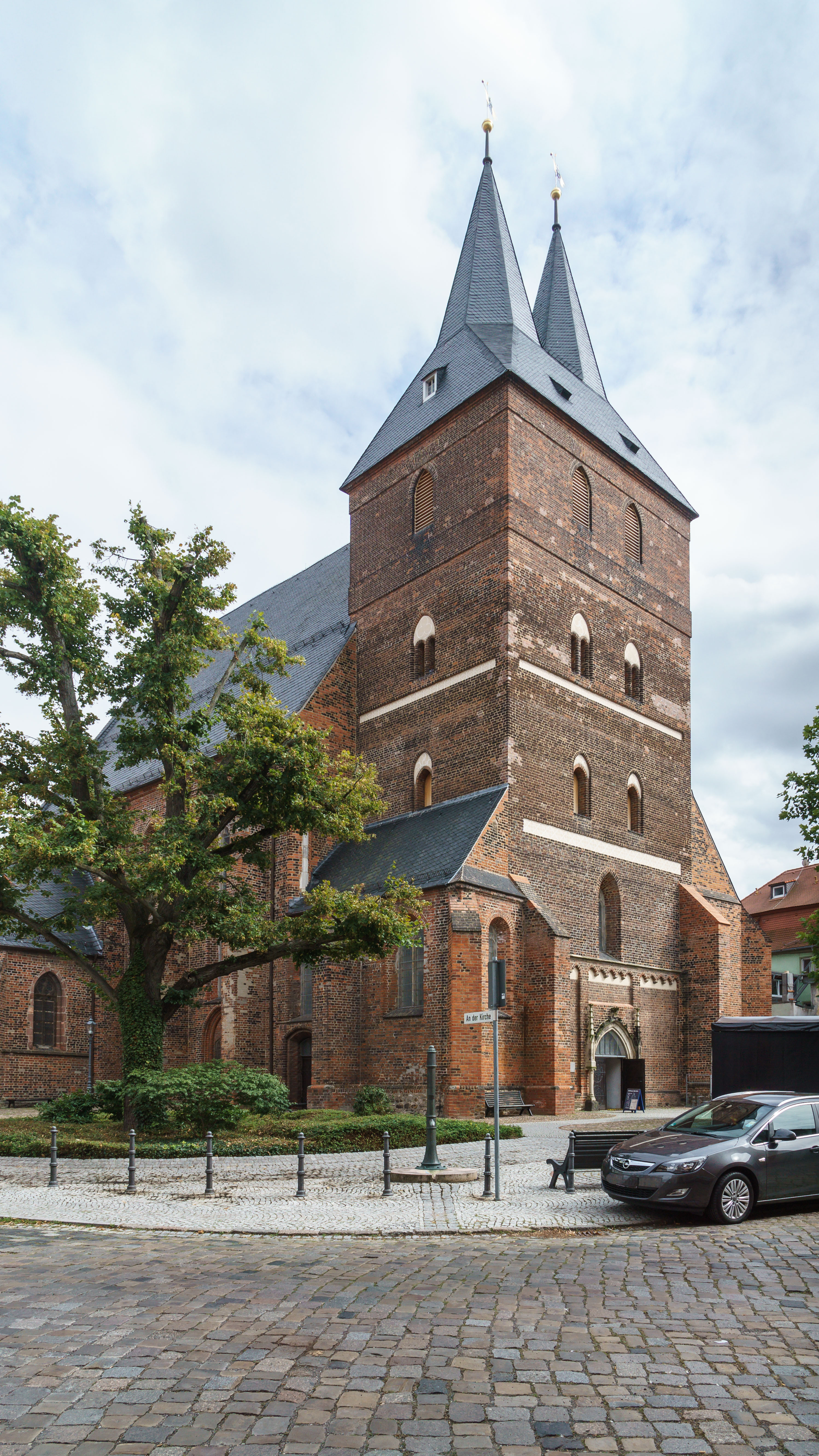 Stadtkirche St. Peter und Paul, An der Kirche in Delitzsch. Kirchturm und Hauptportal